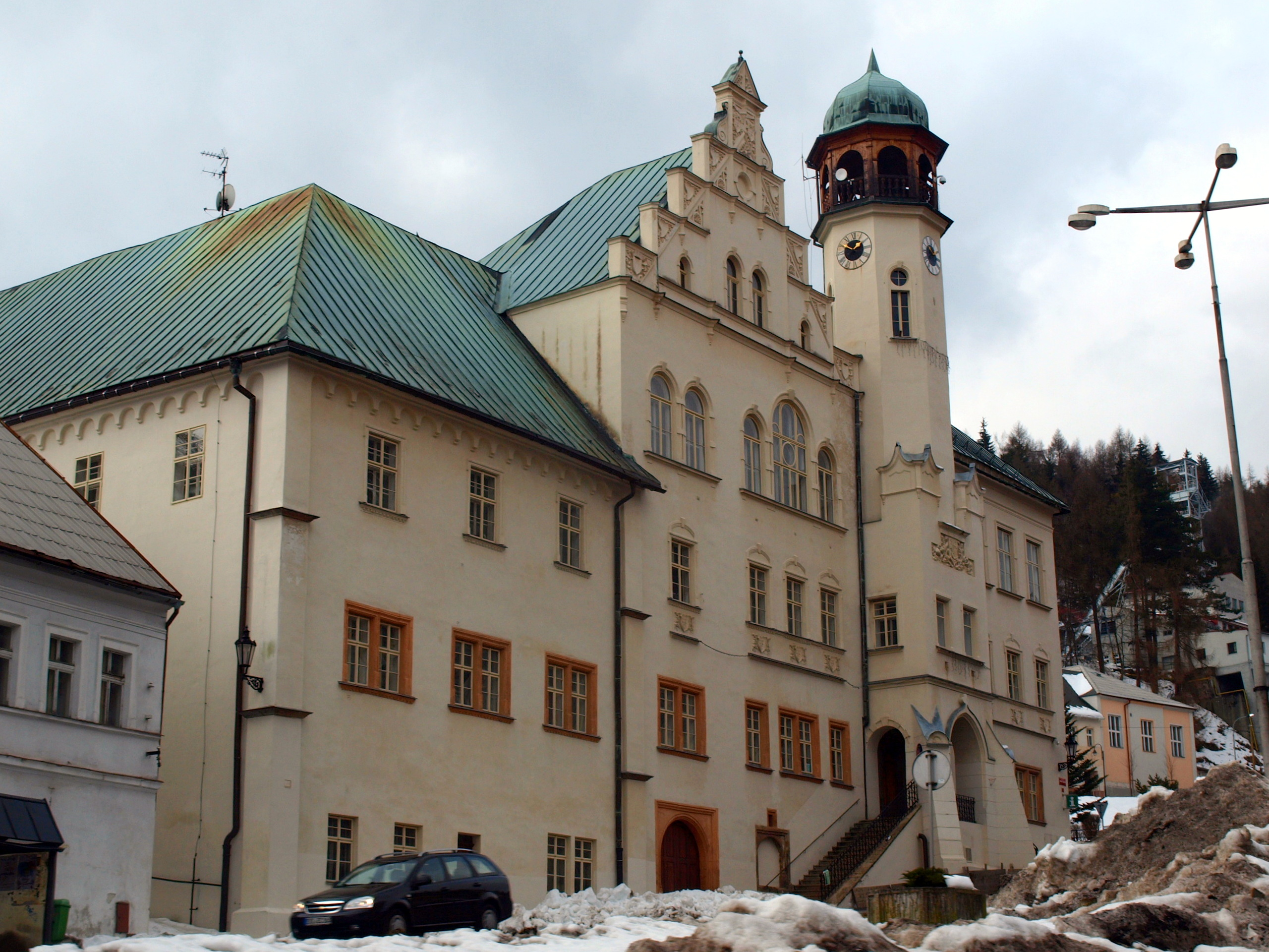 Jáchymov